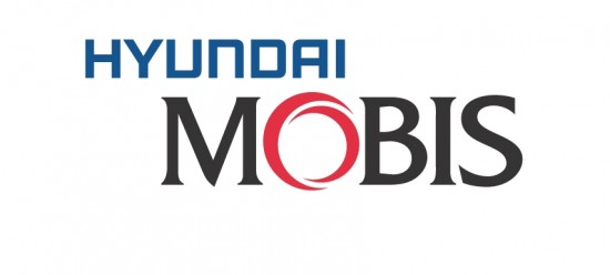 Hyundai Mobis logo